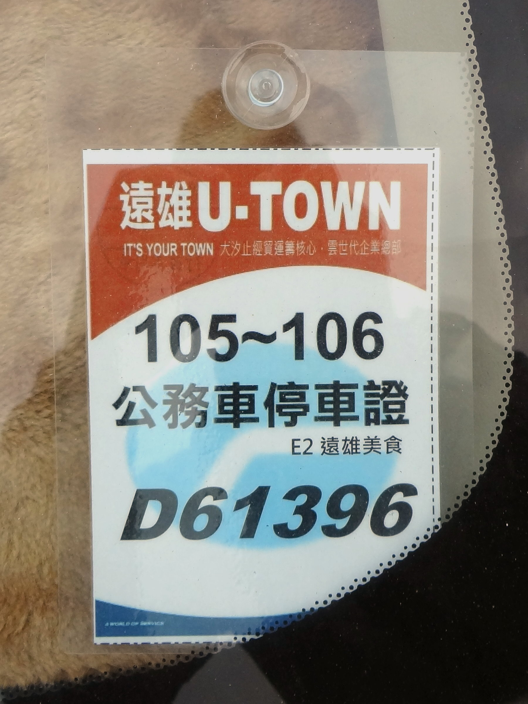 中文（台灣）: 遠雄U-TOWN中華民國105至106年公務車停車證。